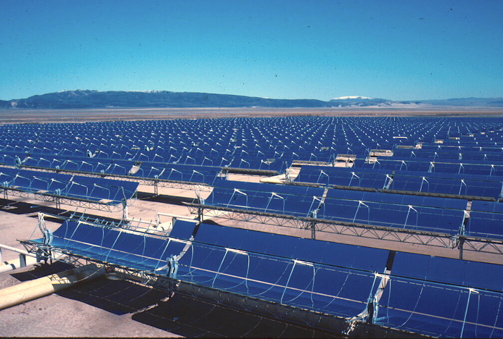 Vor rund 15 Jahren gingen die ersten kommerziellen Parabolrinnen-Kraftwerke mit insgesamt 354 Megawatt in Kalifornien ans Netz. Bis heute haben sie mehr als die Hälfte des weltweit erzeugten Solarstroms produziert und dabei über 1,6 Milliarden US-Dollar erwirtschaftet. (Stand: 2004)